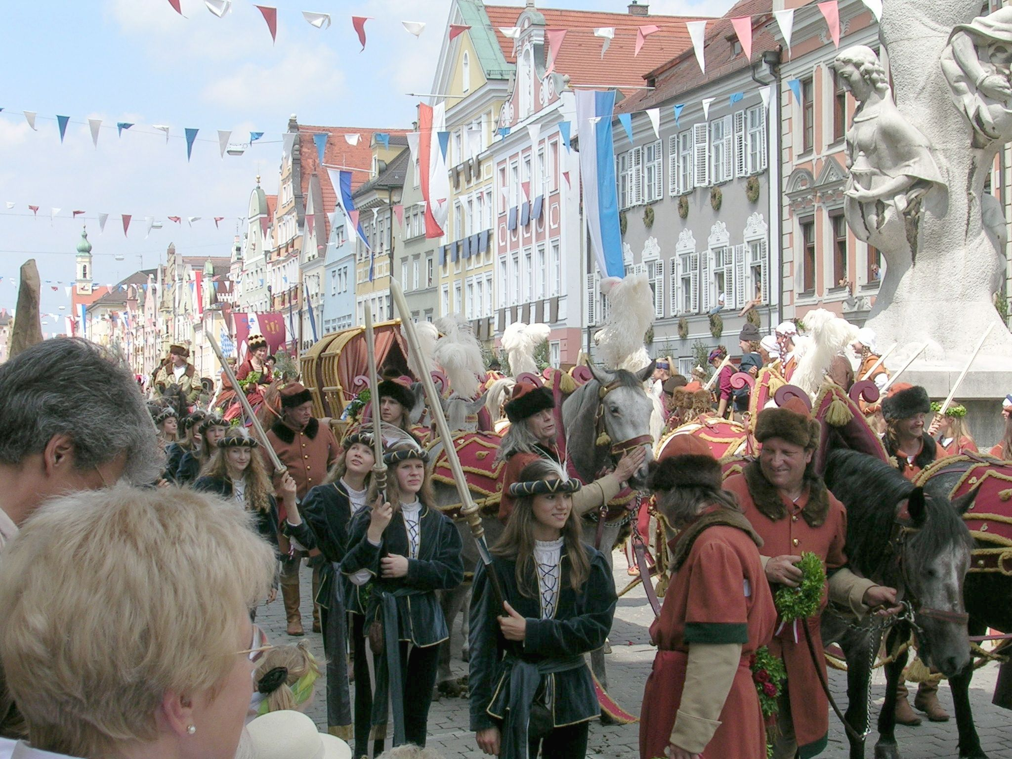 Landshuter Hochzeit, 2005